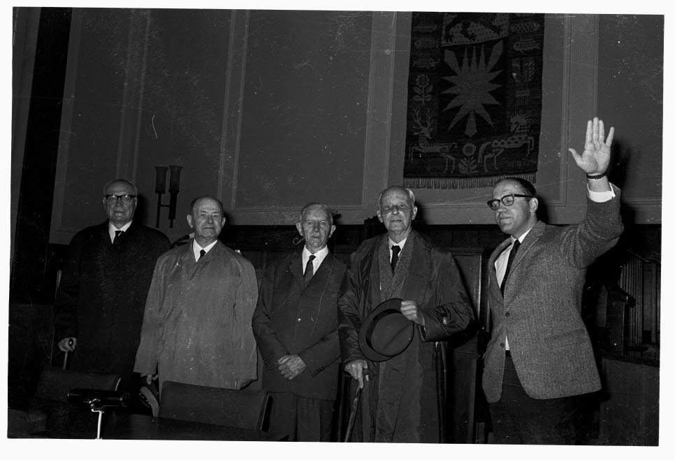 Im Bild Artillerieoffizier a.D. vom Linienschiff WESTFALEN Karl Hinsch (1.v.l.), Generaladmiral a.D. Conrad Albrecht (ehem. Chef der Marinestation Ostsee, 2.v.l.), Fregattenkapitän a.D. Nieden (3.v.l.), Erich Edgar Schulze (Neffe des Großadmirals Alfred von Tirpitz, 4.v.l.).